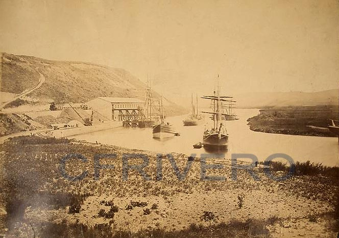 Anónimo. [Muelle de la Requejada en la ría de San Martín de la Arena, Hinojedo (Cantábria)]. Albúmina, h 1880/90 (Col. Fernández Rivero)